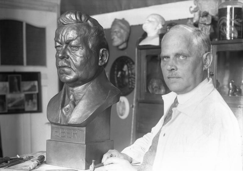 Eine neue Büste des verstorbenen ersten Reichspräsidenten Friedrich Ebert! Die neue Broncebüste des verstorbenen ersten Reichspräsidenten Friedrich Ebert wurde von dem Berliner Bildhauer Friedrich Franz Brockmüller hergestellt